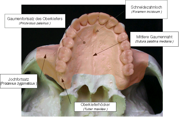 Abbildung des menschlichen Oberkiefers